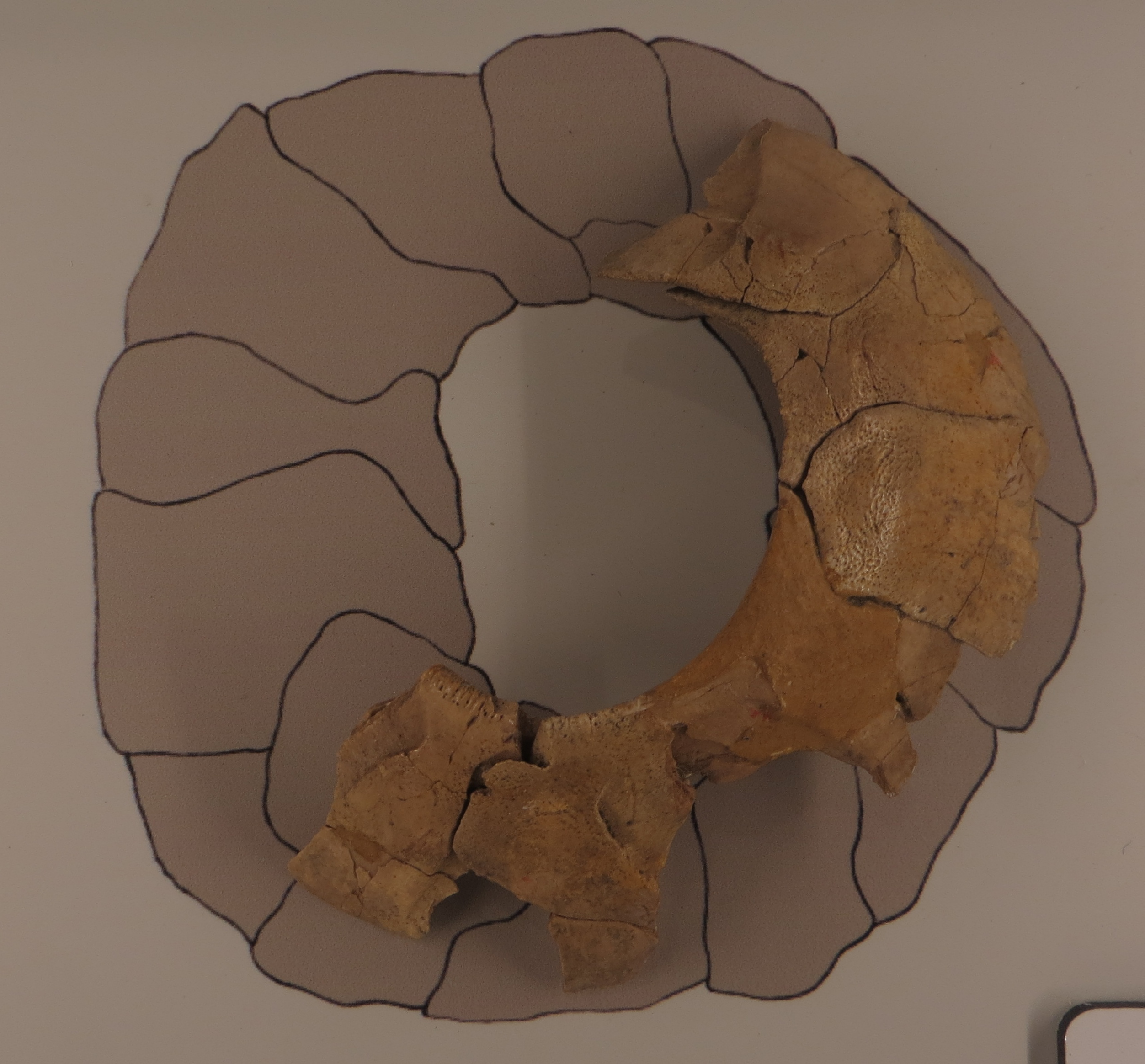 Fossil - Took The picture at Royal Belgian Institute of Natural Sciences, Brussels